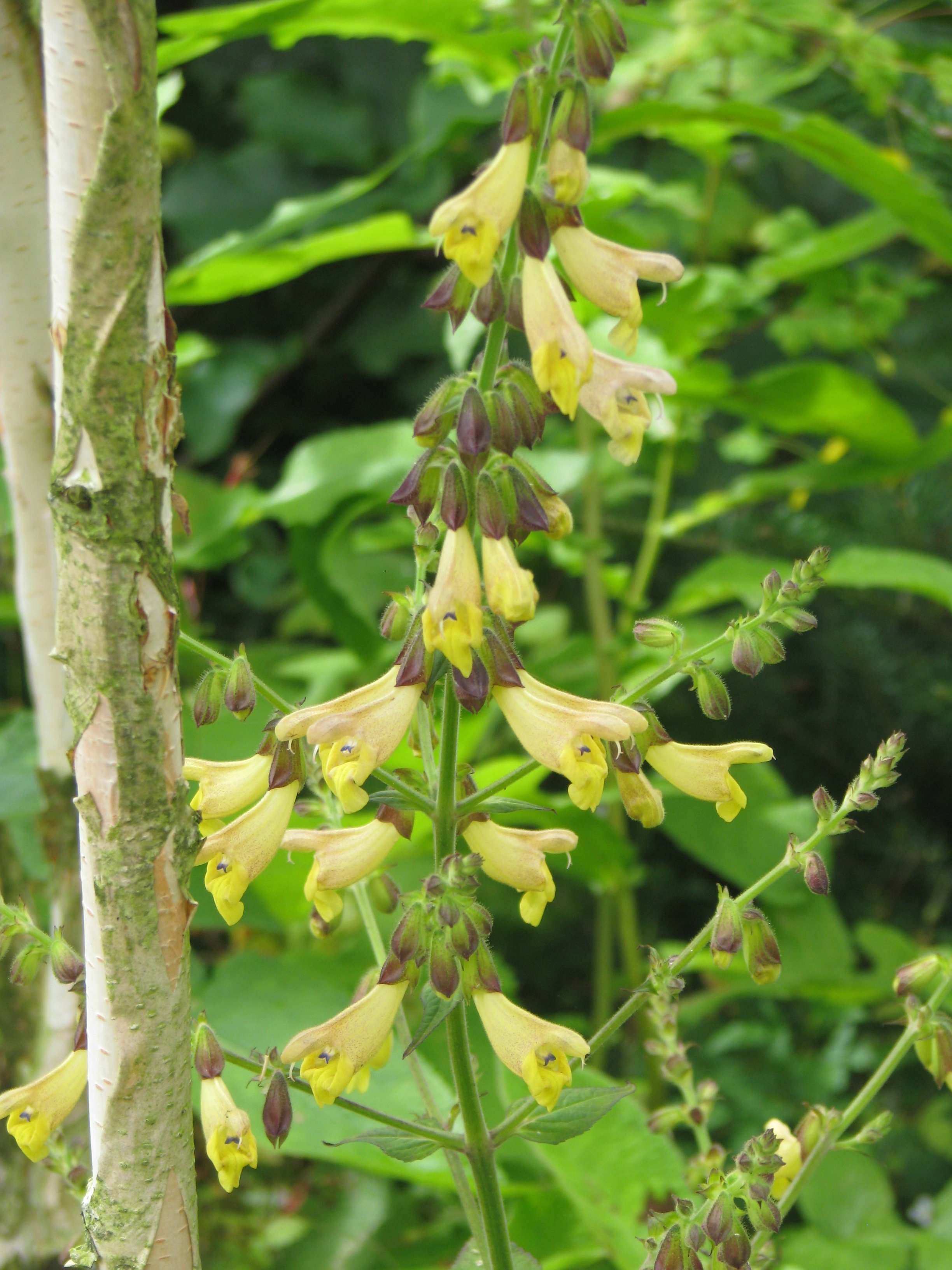 Salvia omeiana, Crug Thundercloud